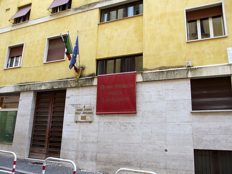 Musée historique de la Libération à Rome